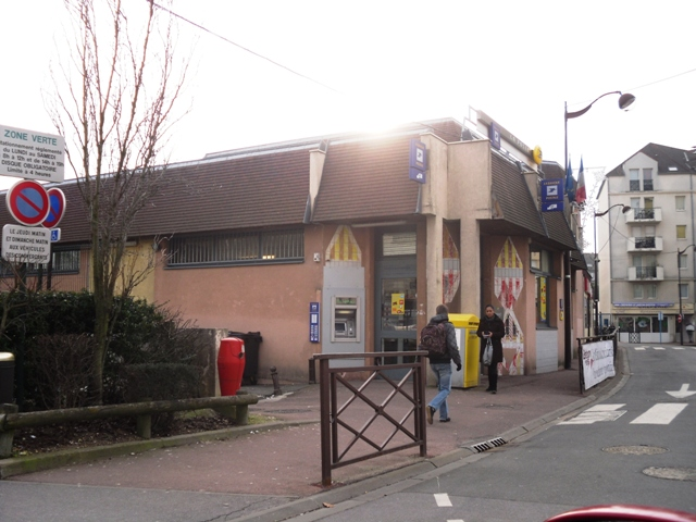 L'agence postale de Brétigny-sur-Orge (91)